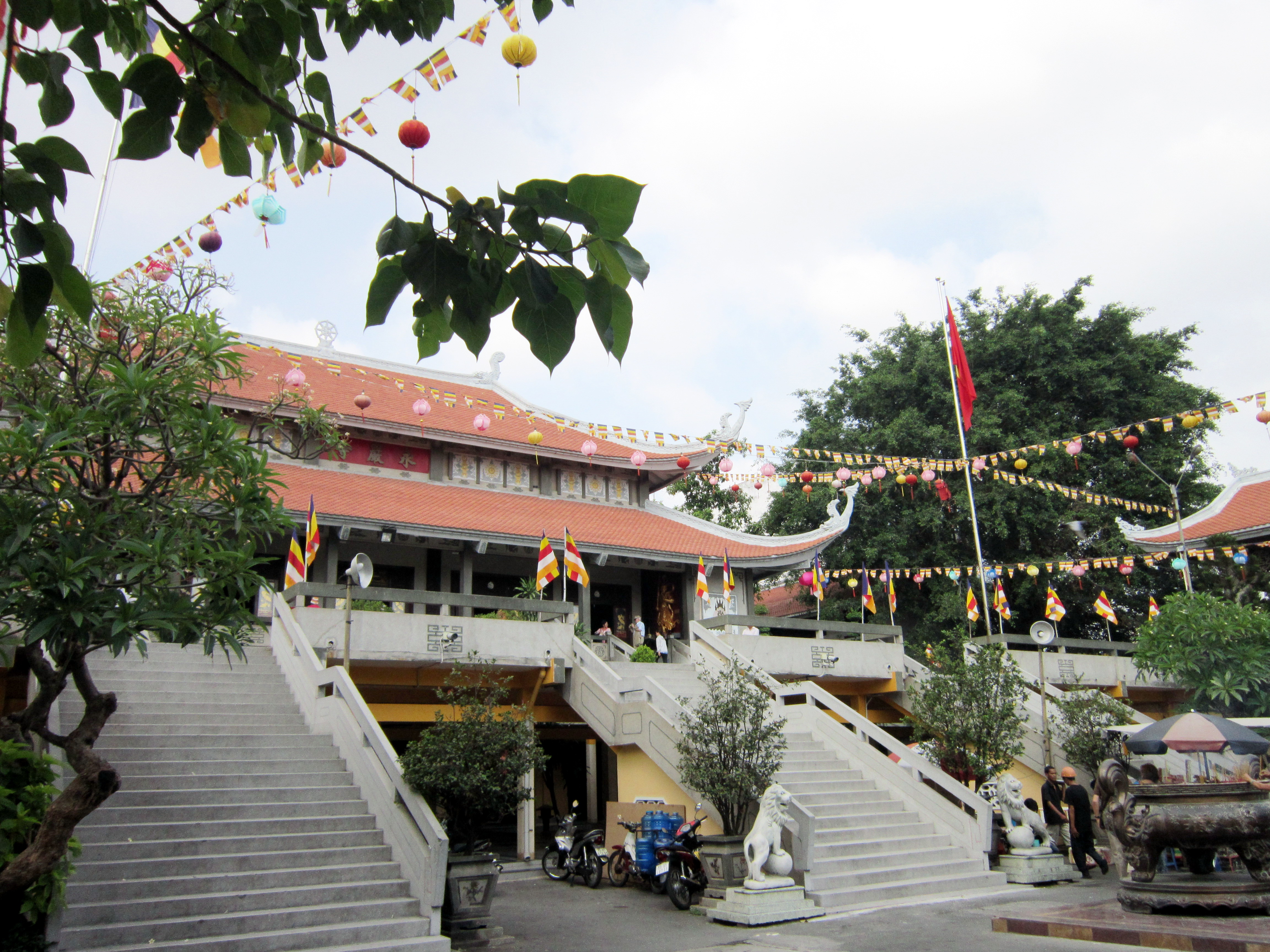 Chùa Vĩnh Nghiêm là một danh lam, hiện tọa lạc tại số 339 Nam Kỳ Khởi Nghĩa, thuộc phường 7, quận 3, Thành phố Hồ Chí Minh, Việt Nam.